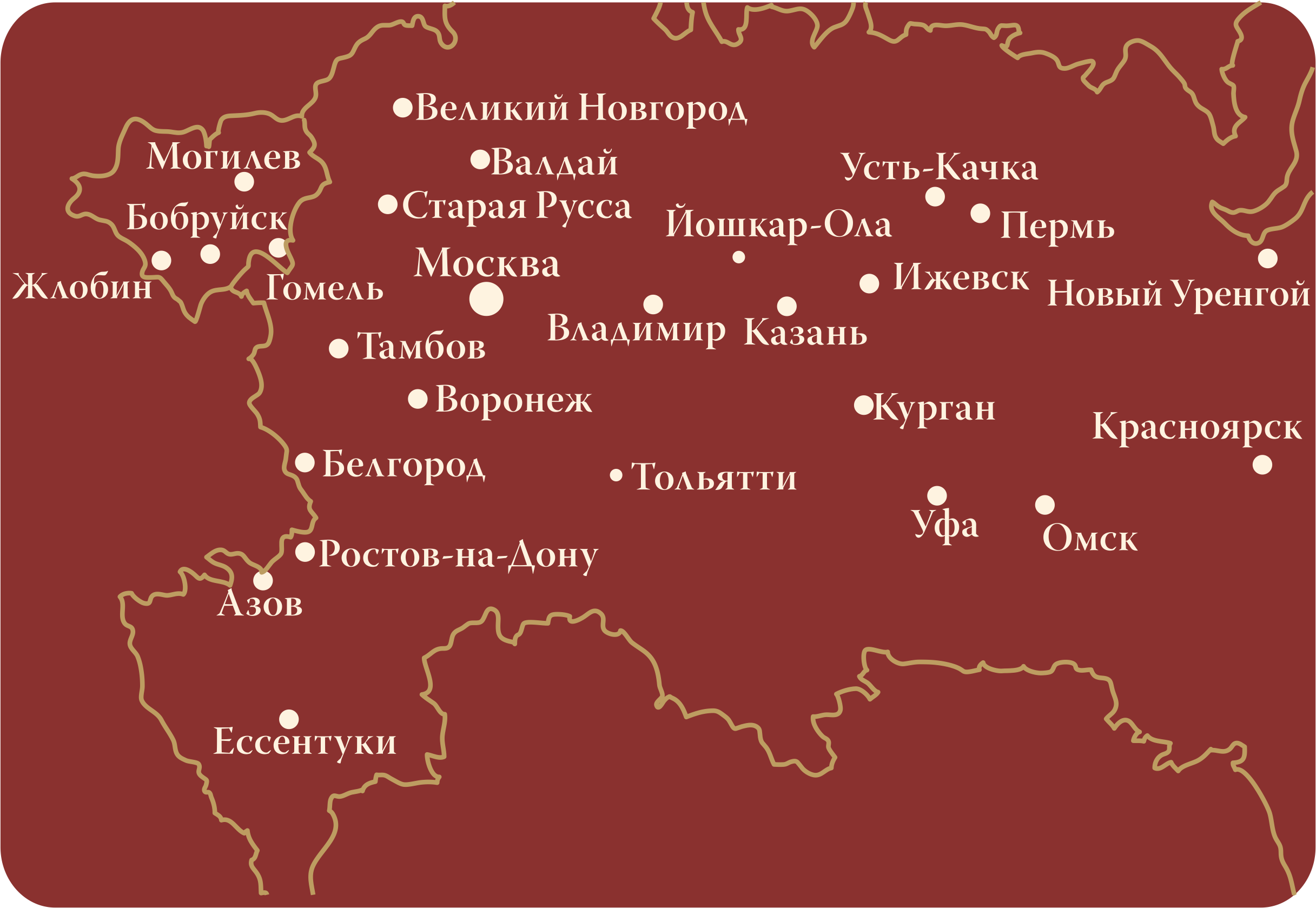 География отелей сети AMAKS Hotels&Resorts (2015)